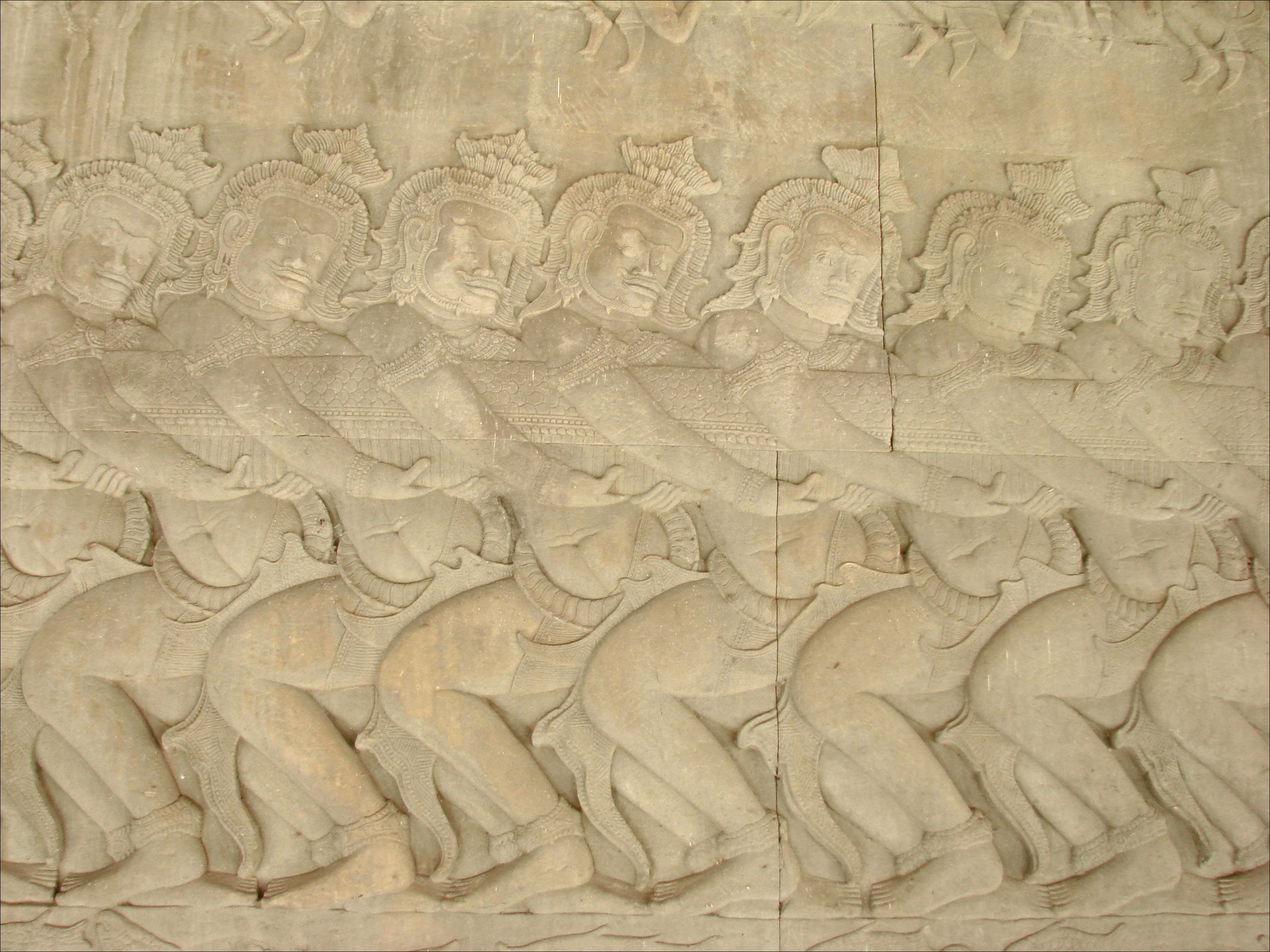 Détail du barattage de la Mer de Lait : les démons (asura) tirent le corps du nâga Au-dessus, les apsaras ou nymphes célestes qui sont nées du barattage Le barattage de la Mer de Lait est un grand mythe hindou de la Création. Dans la galerie est, aile sud d'Angkor Vat, il est représenté sur un bas-relief de 49 m de long qui a été restauré ces dernières années. Au début des temps, les dieux ou deva et les démons ou asura, qui étaient alors tous mortels, étaient en lutte pour la maîtrise du monde. Les deva, affaiblis et vaincus, demandèrent l'assistance de Vishnou qui leur proposa d'unir leurs forces à celles des asura dans le but d'extraire l'amrita, le nectar d'immortalité de Kshirodadhî, la mer de lait. Pour ce faire, ils devaient jeter des herbes magiques dans la mer, renverser le mont Mandara de façon à poser son sommet sur la carapace de la tortue Akûpâra, un avatar de Vishnou, et utiliser le serpent Vâsuki, le roi des Nâgas, pour mettre la montagne en rotation en tirant alternativement. extrait de l'article de Wikipedia